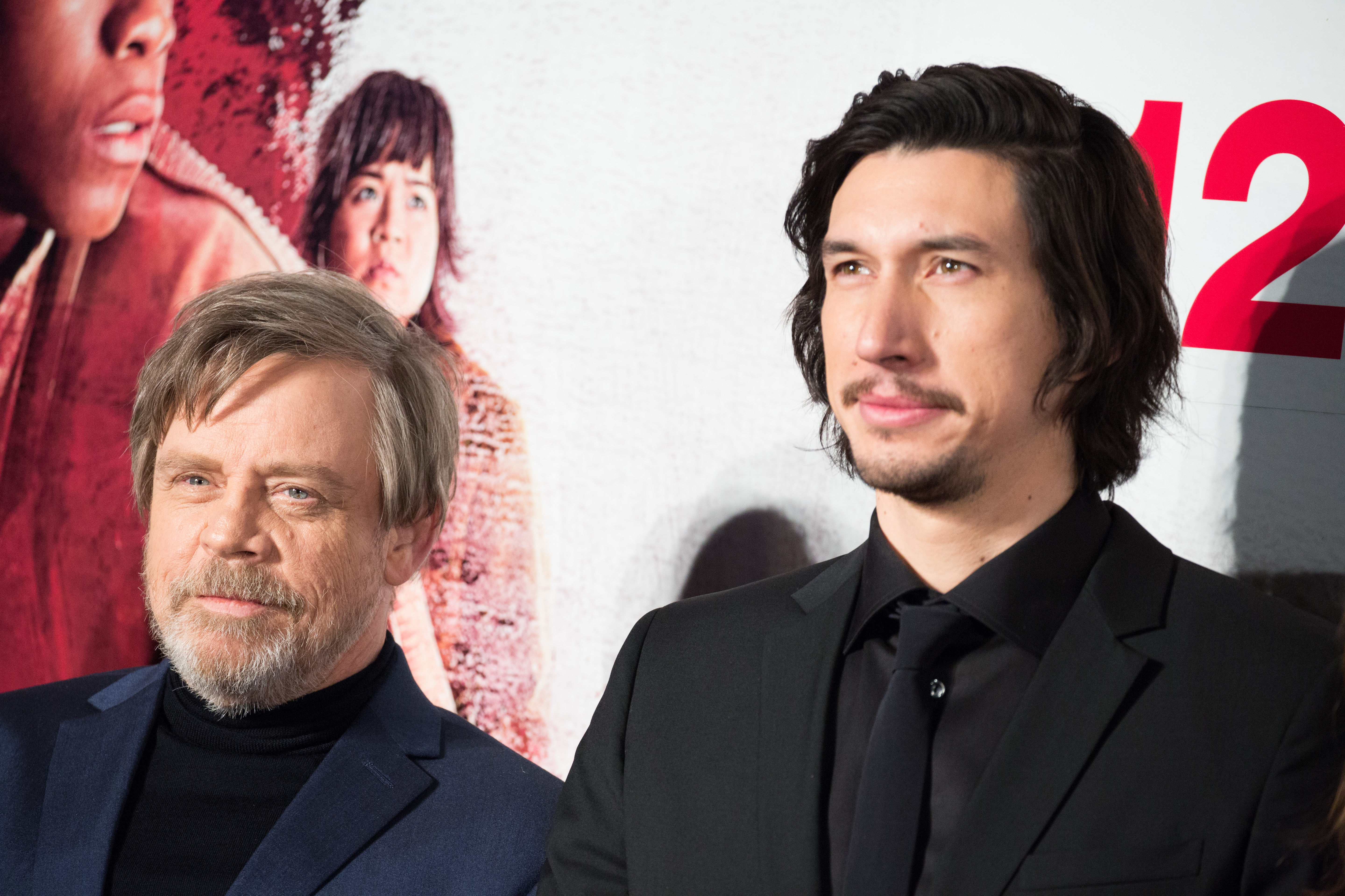 スター・ウォーズ/最後のジェダイ ジャパン・プレミア レッドカーペット マーク・ハミル アダム・ドライバー